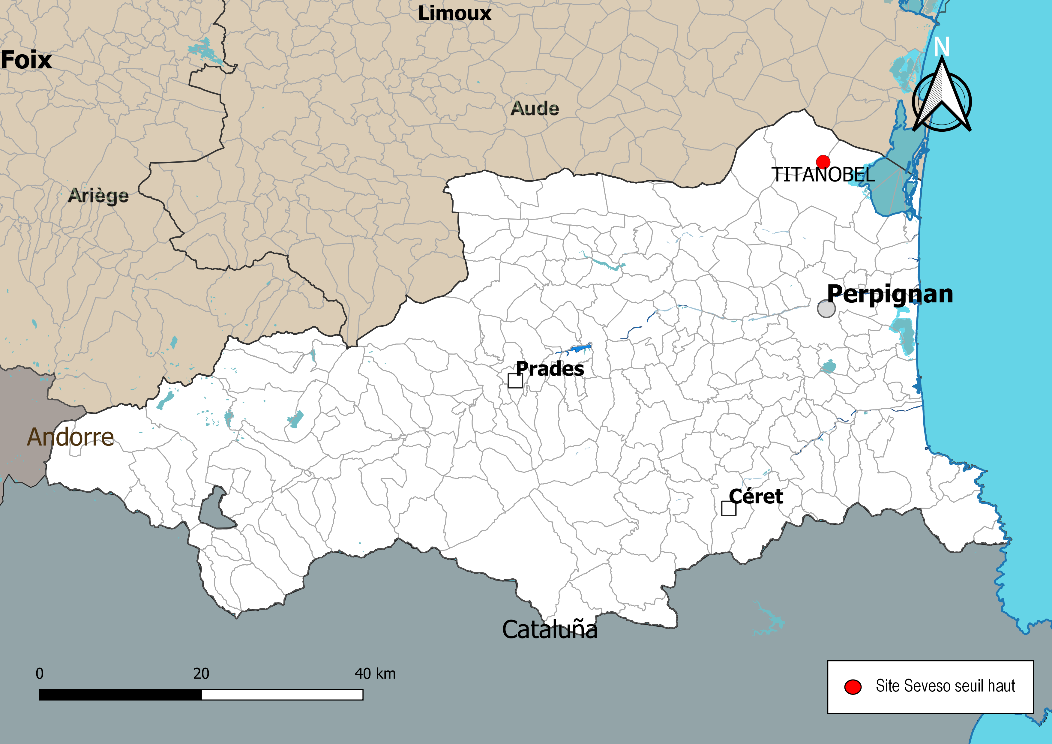 Carte de localisation des sites Seveso seuil haut dans le département des Pyrénées-Orientales (Occitanie, France). Carte arrêtée au 7 novembre 2019.